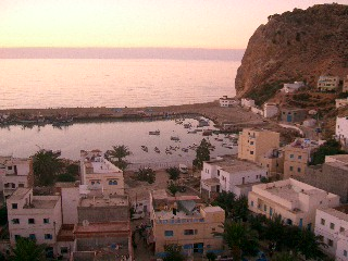 El Jebha